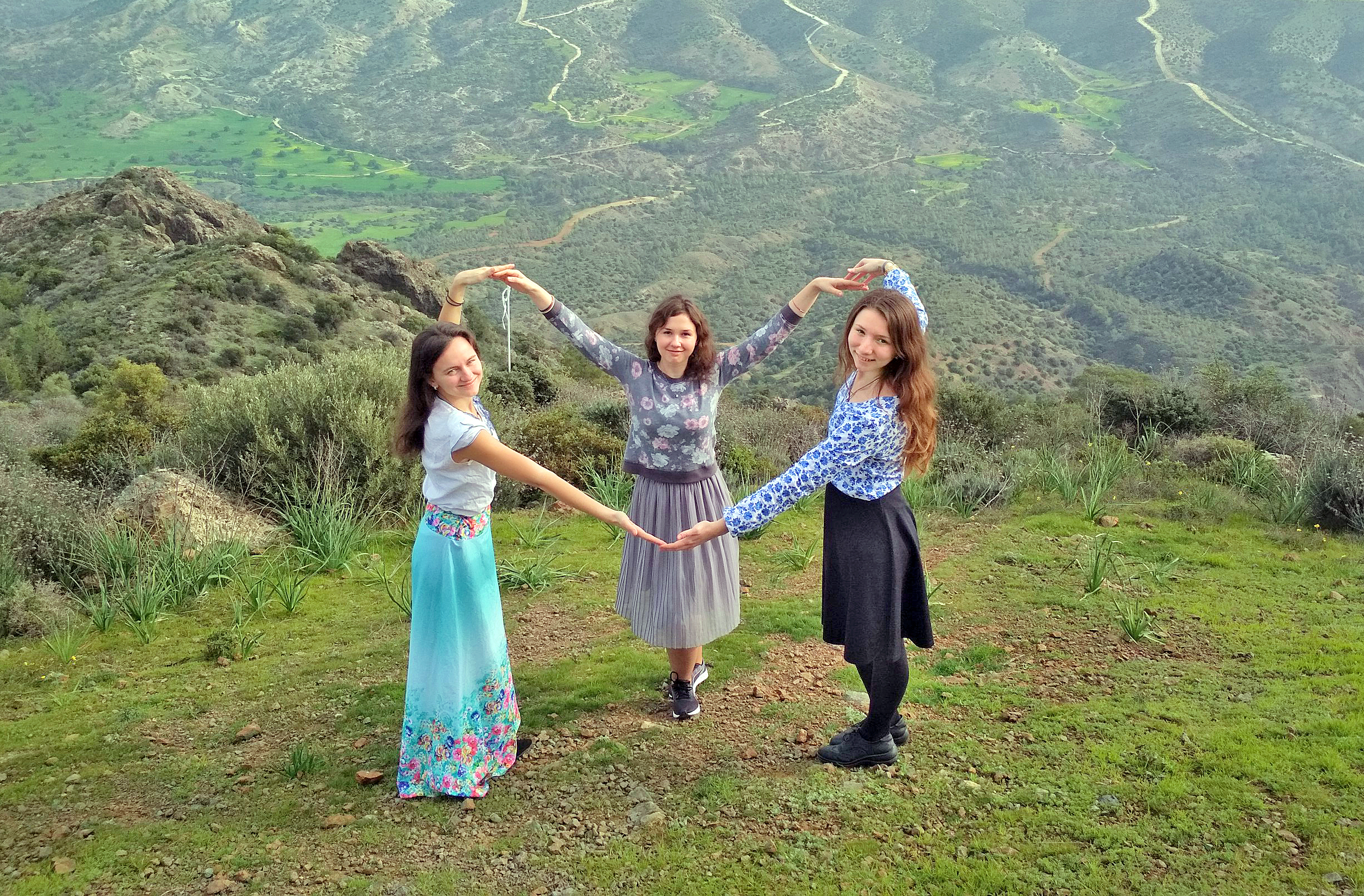 Зимний фестиваль «Братья» на Кипре. Ангелина Кривцова, Анна Савина, Мария Афанасова